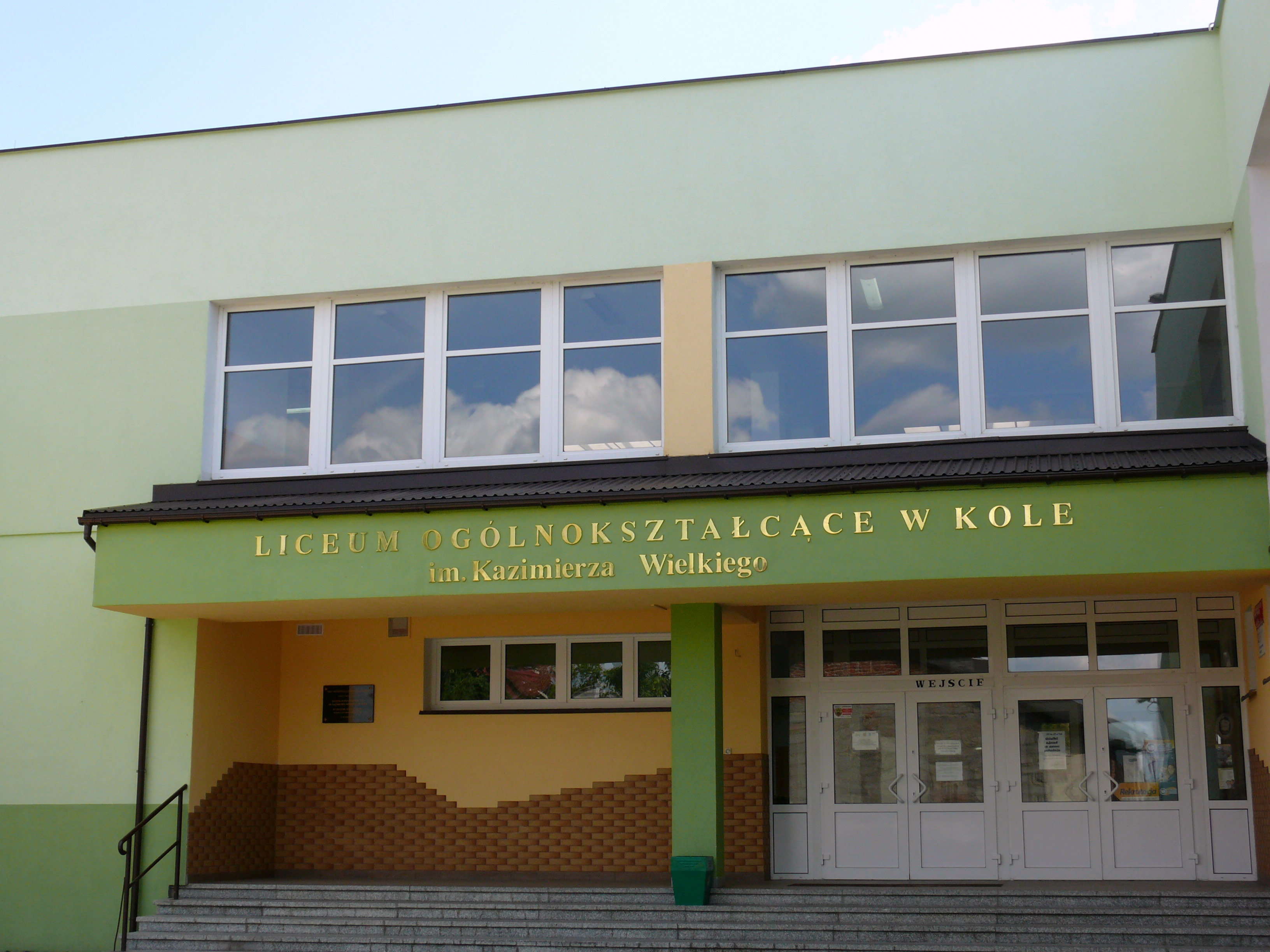 LO w Kole